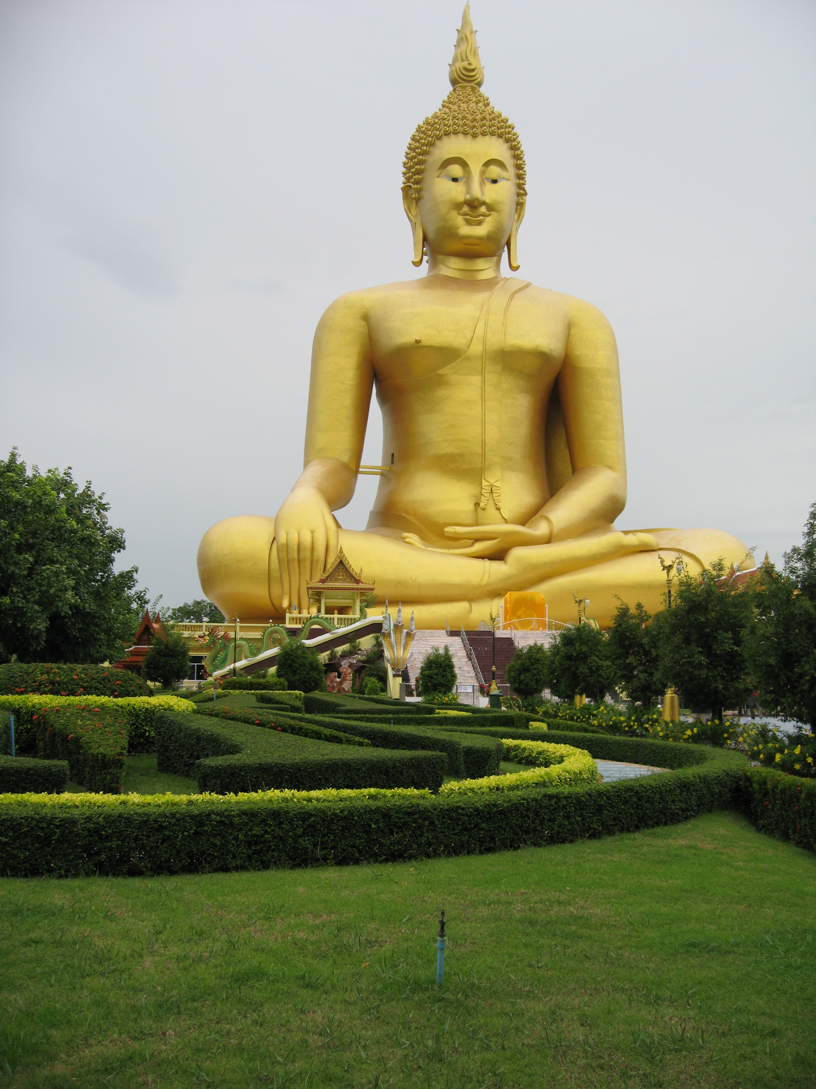 Huge Buddha